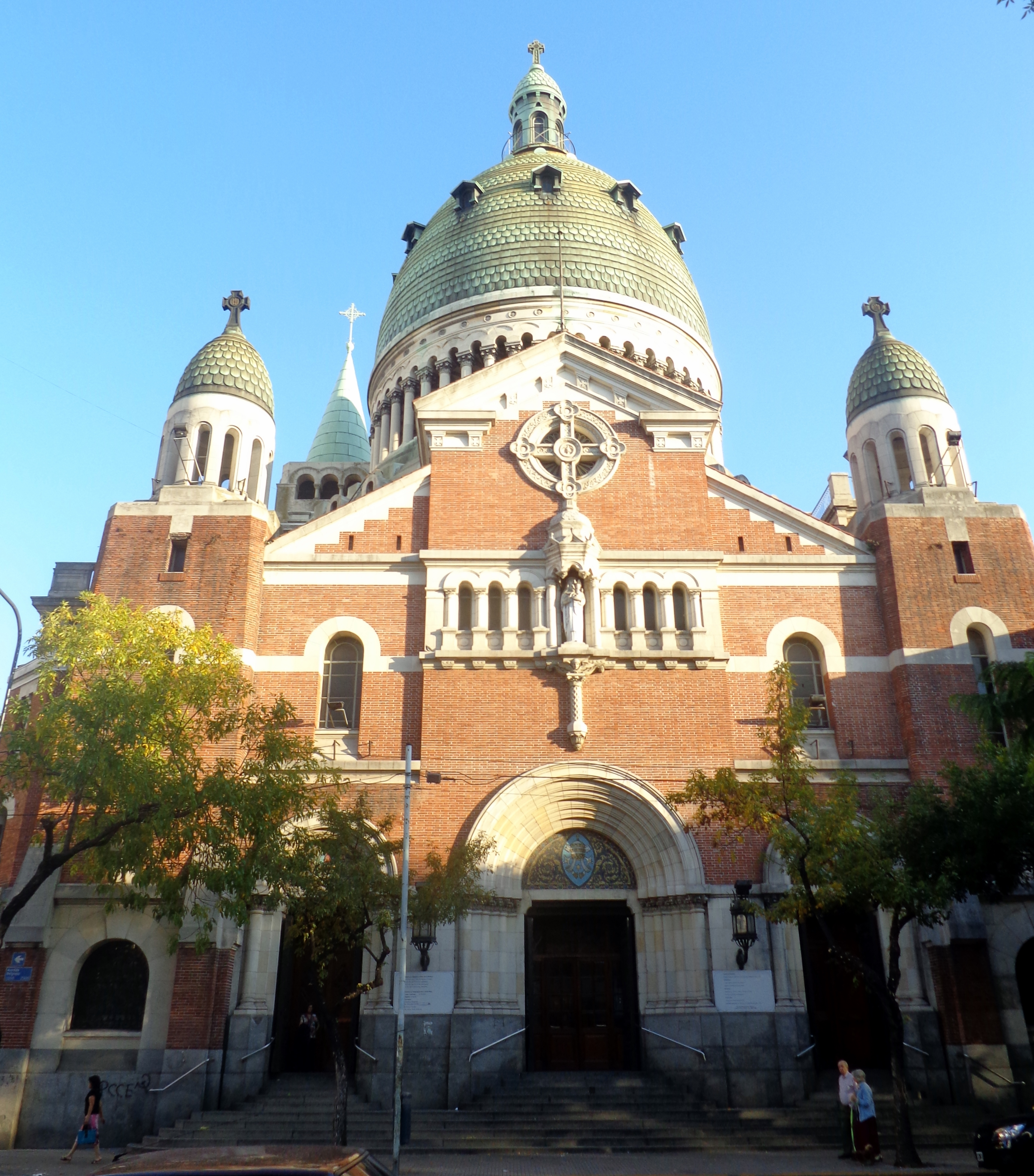 Basílica Santa Rosa de Lima, en Avenida Belgrano, barrio de Balvanera, Buenos Aires, Argentina.